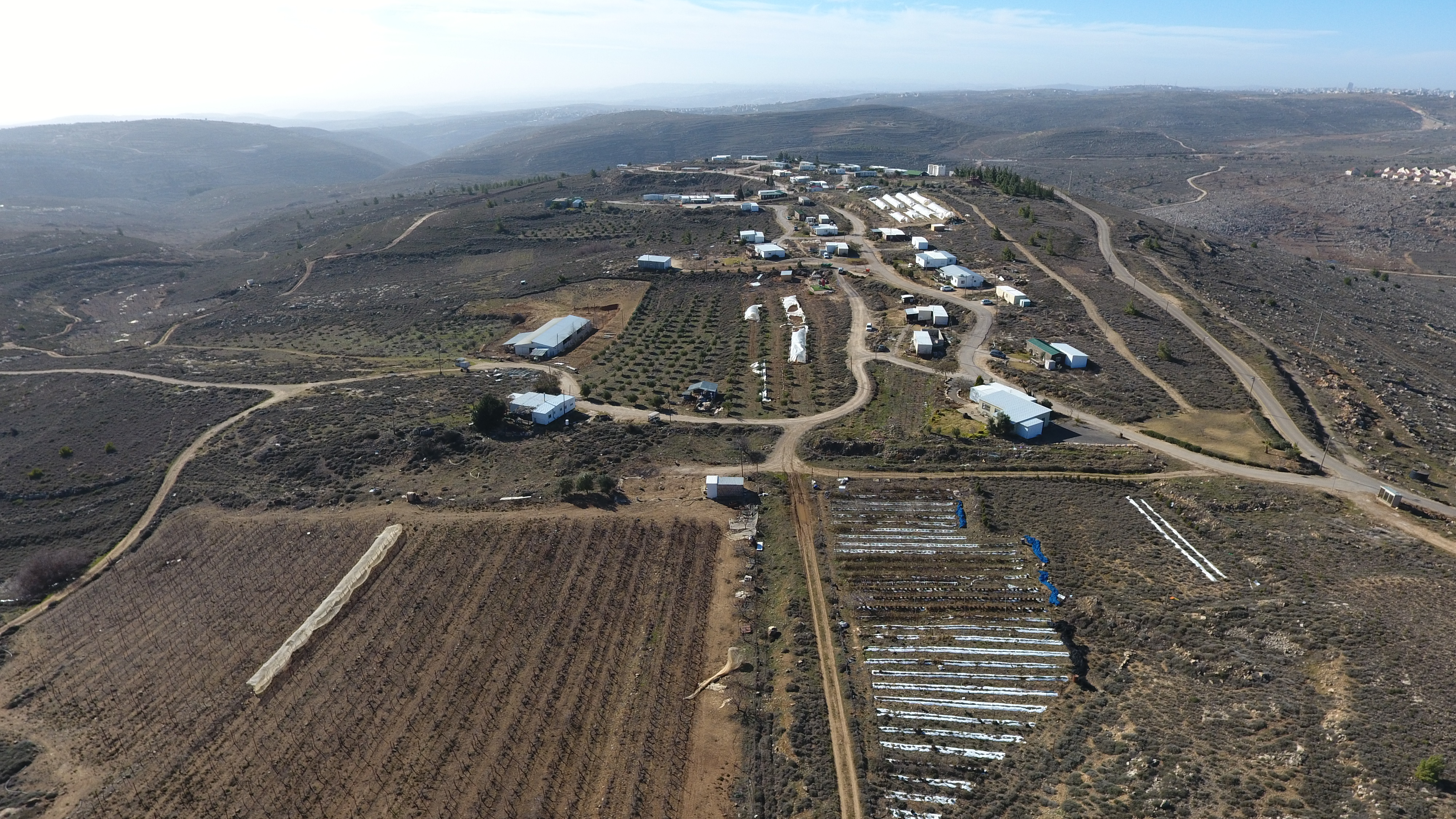 עמונה, חורף תשע"ז, מבט מצפון